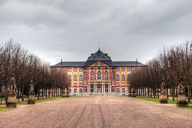 Bruchsal, Schloss